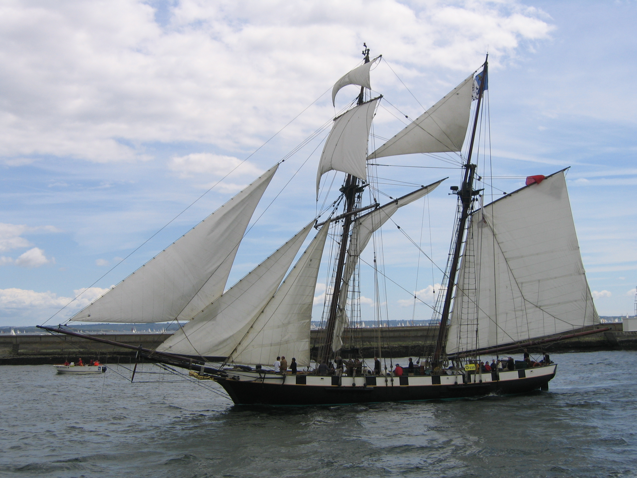 Lors de Brest 2008